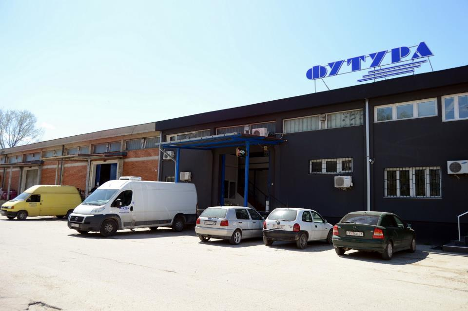 Футура ПП